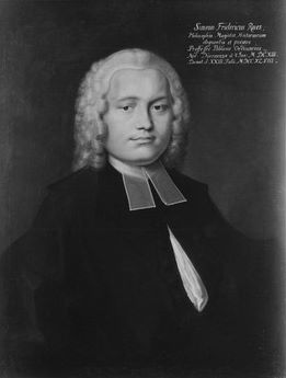 Gemälde in der Professorengalerie Tübingen